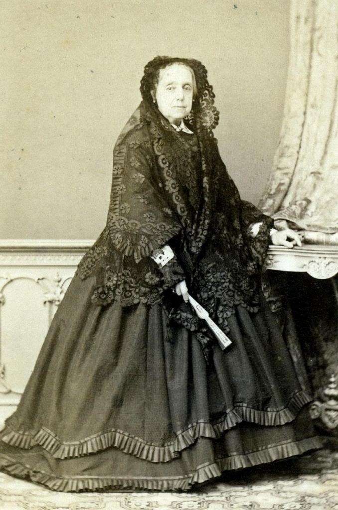 María Teresa de Braganza (1793-1874)